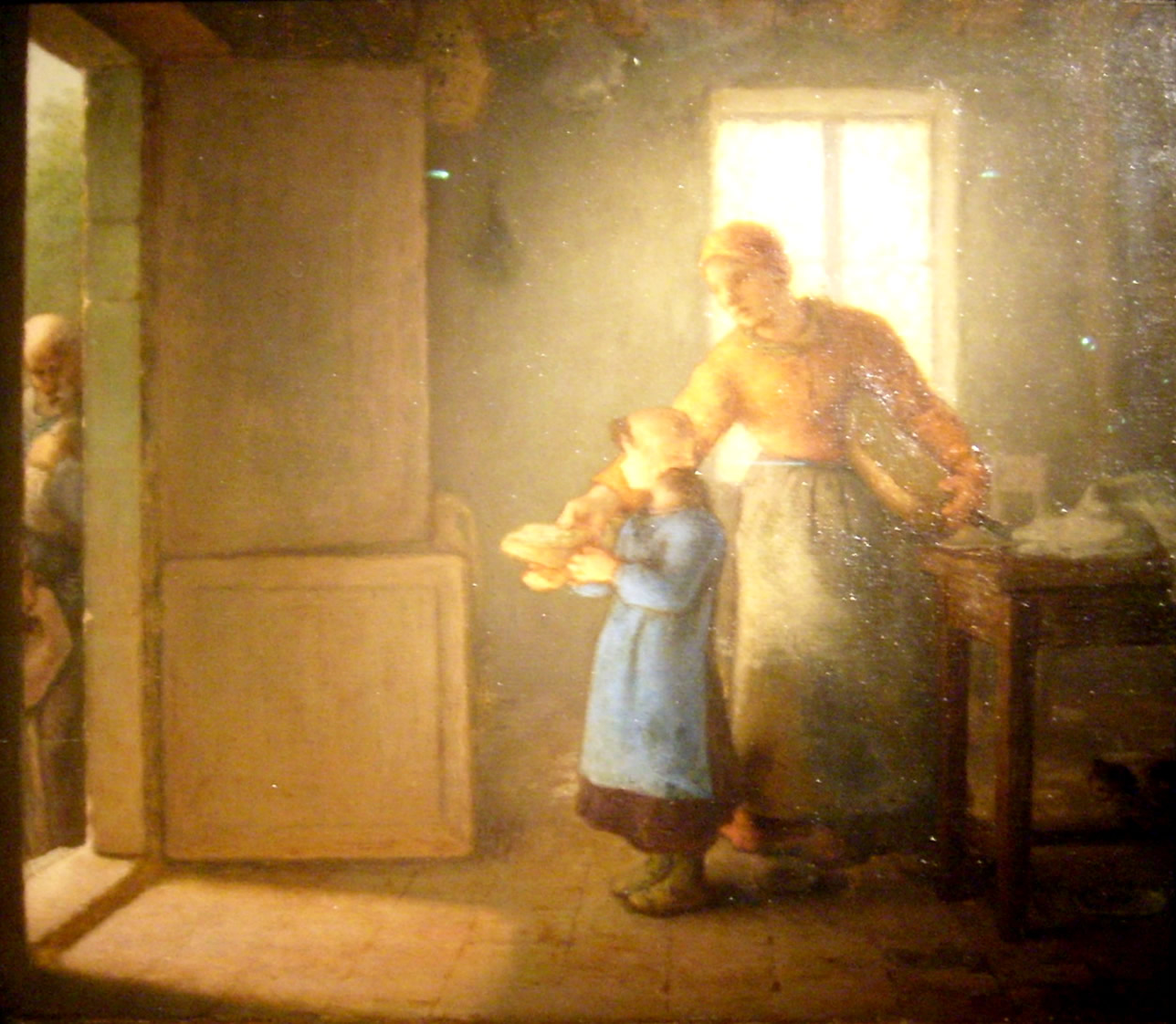 La Charité